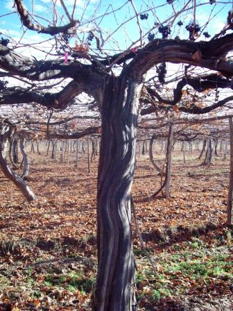 Виноградная плантация зимой (Таджикистан)